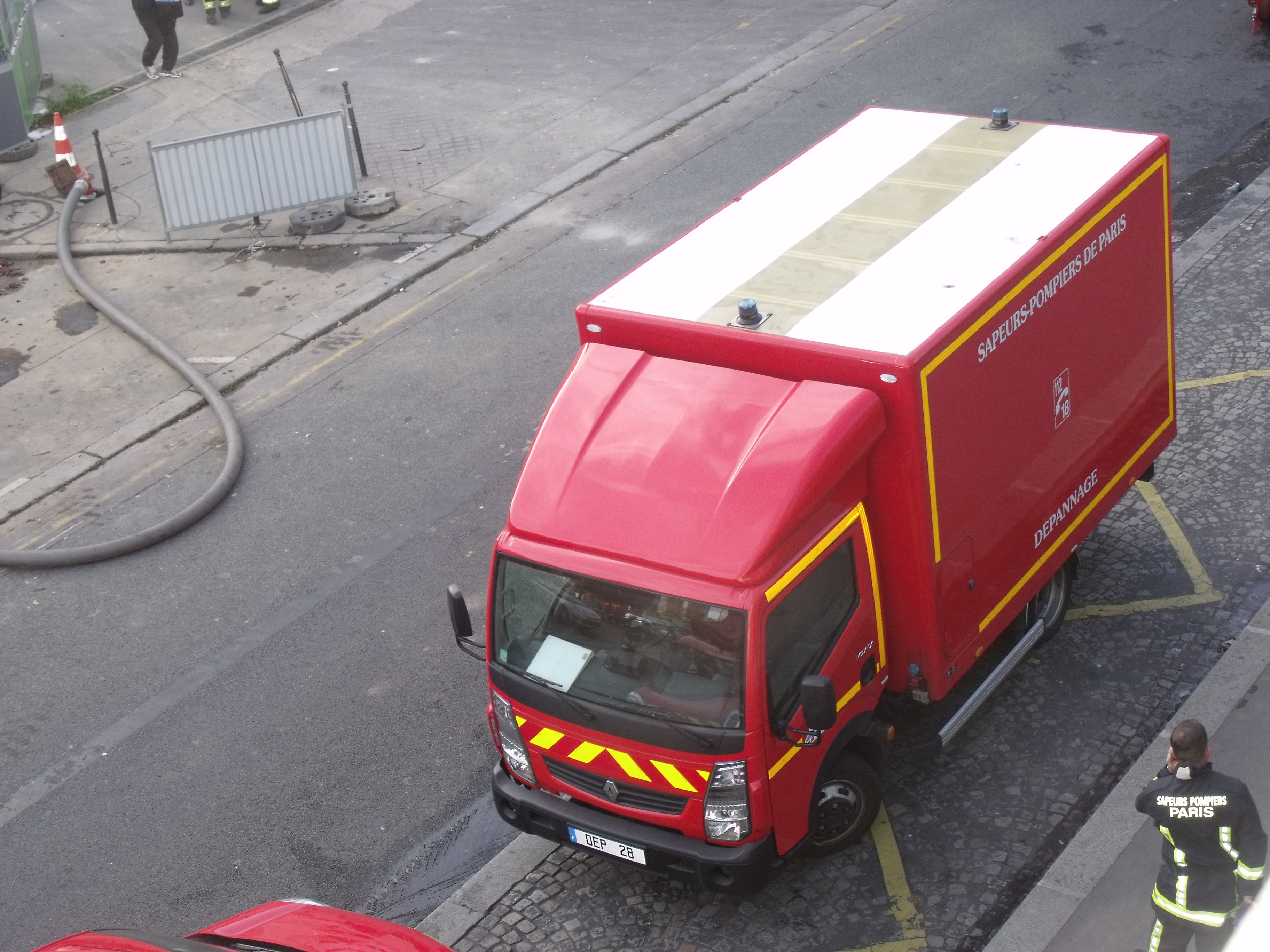 Sur châssis Renault Maxity, vu ici lors de l'intervention du 31 octobre 2014 : incendie de la maison de la radio à Paris.